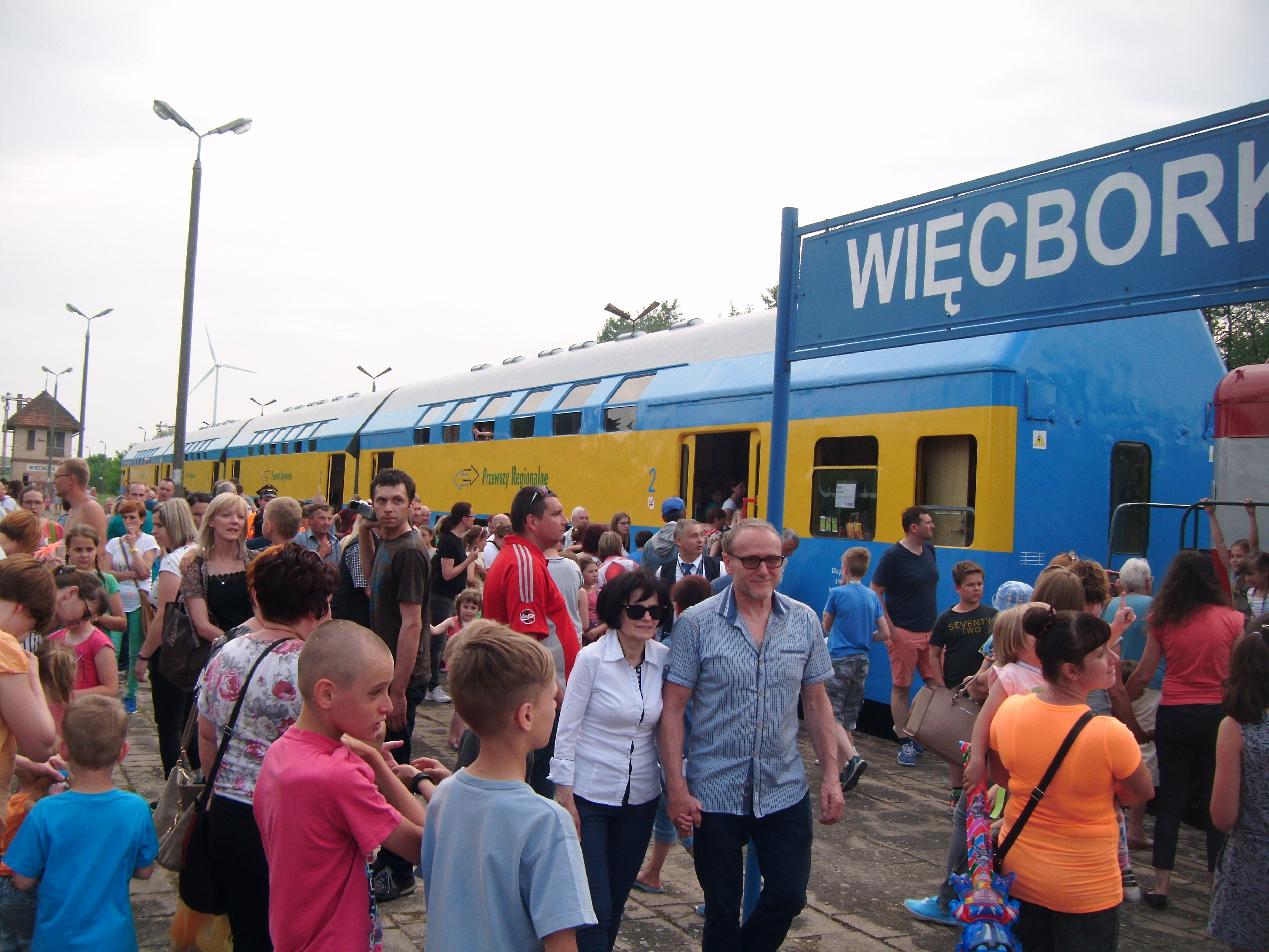 Stacja PKP Więcbork LK 281 - 2016 r.